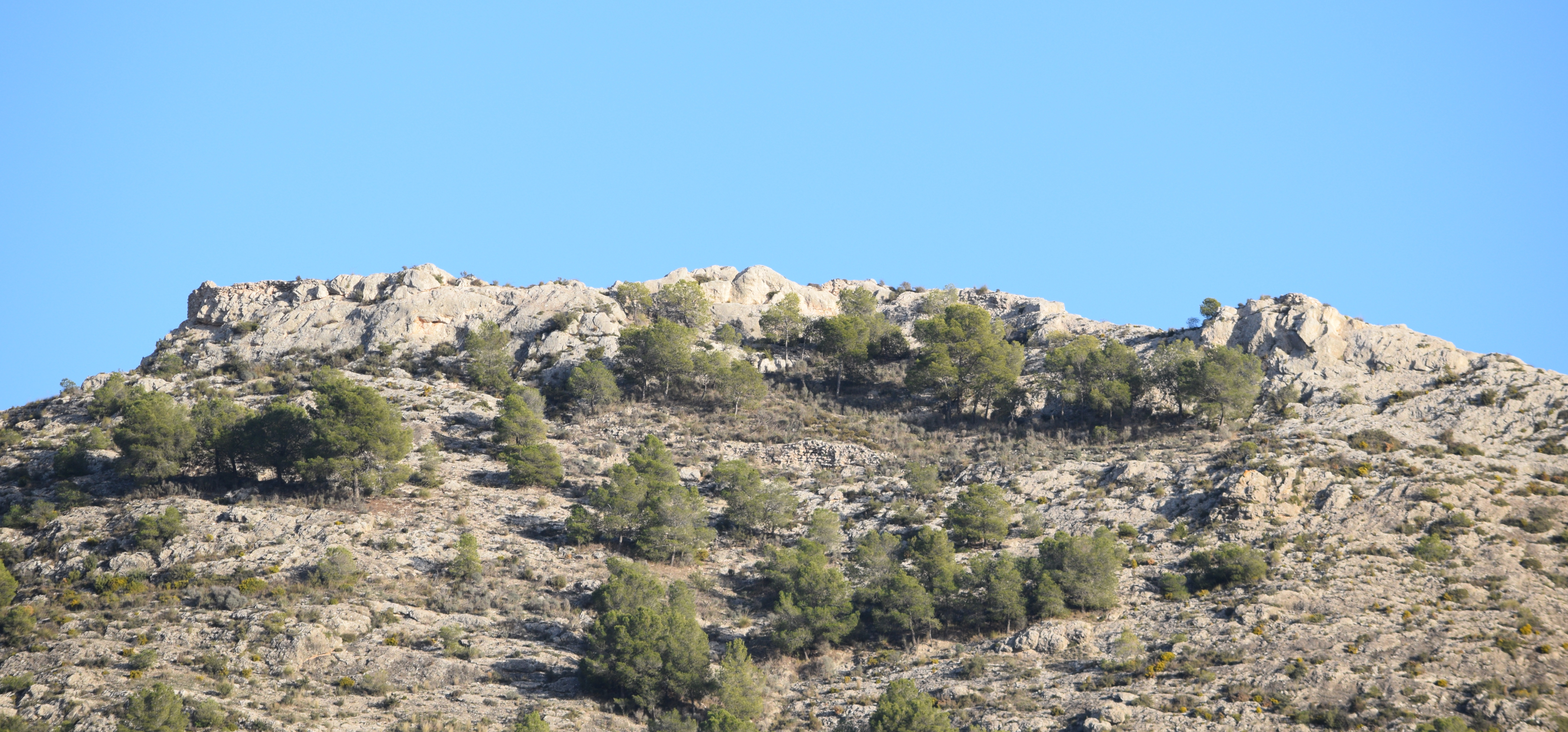 Villena.